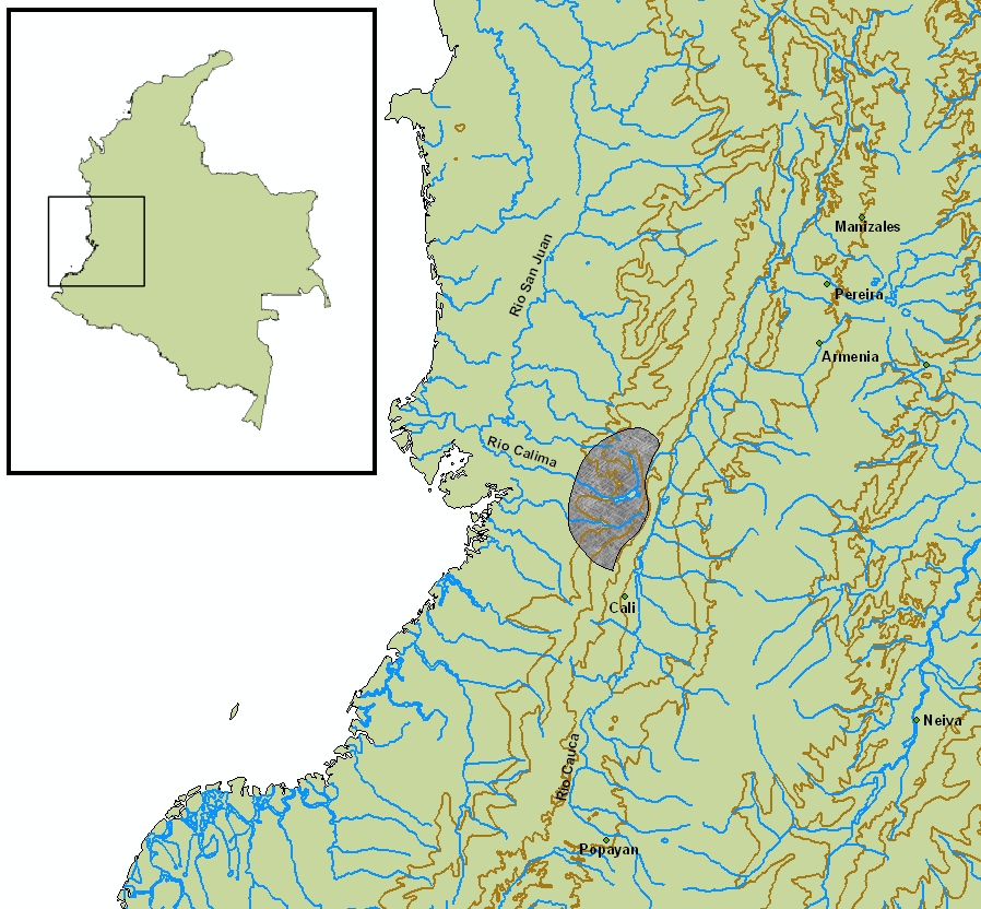 ubicacion geografica cultura ilama, valle del cauca, colombia